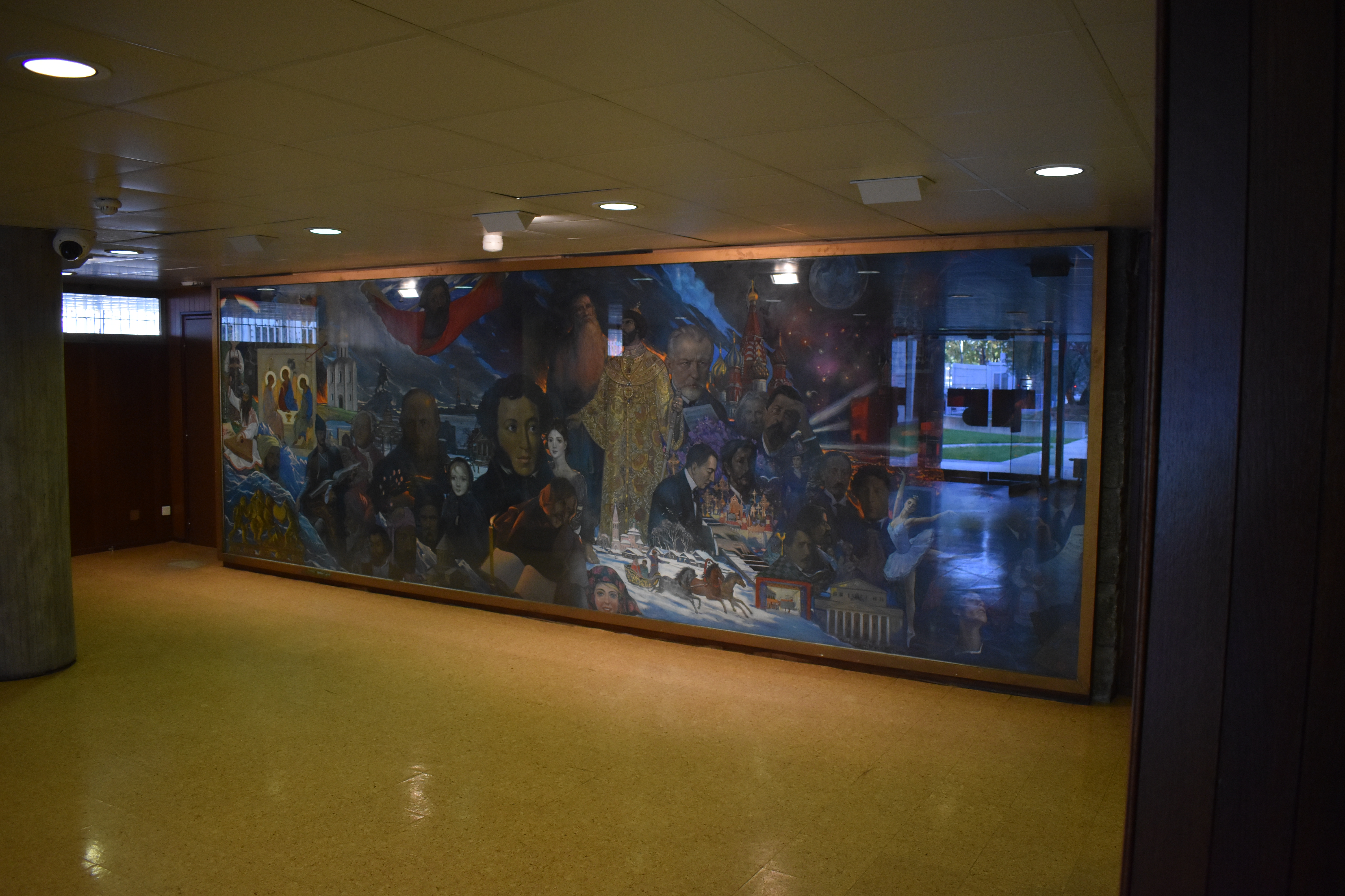 USSR CULTURE PERSONALITIES & REFERENCES